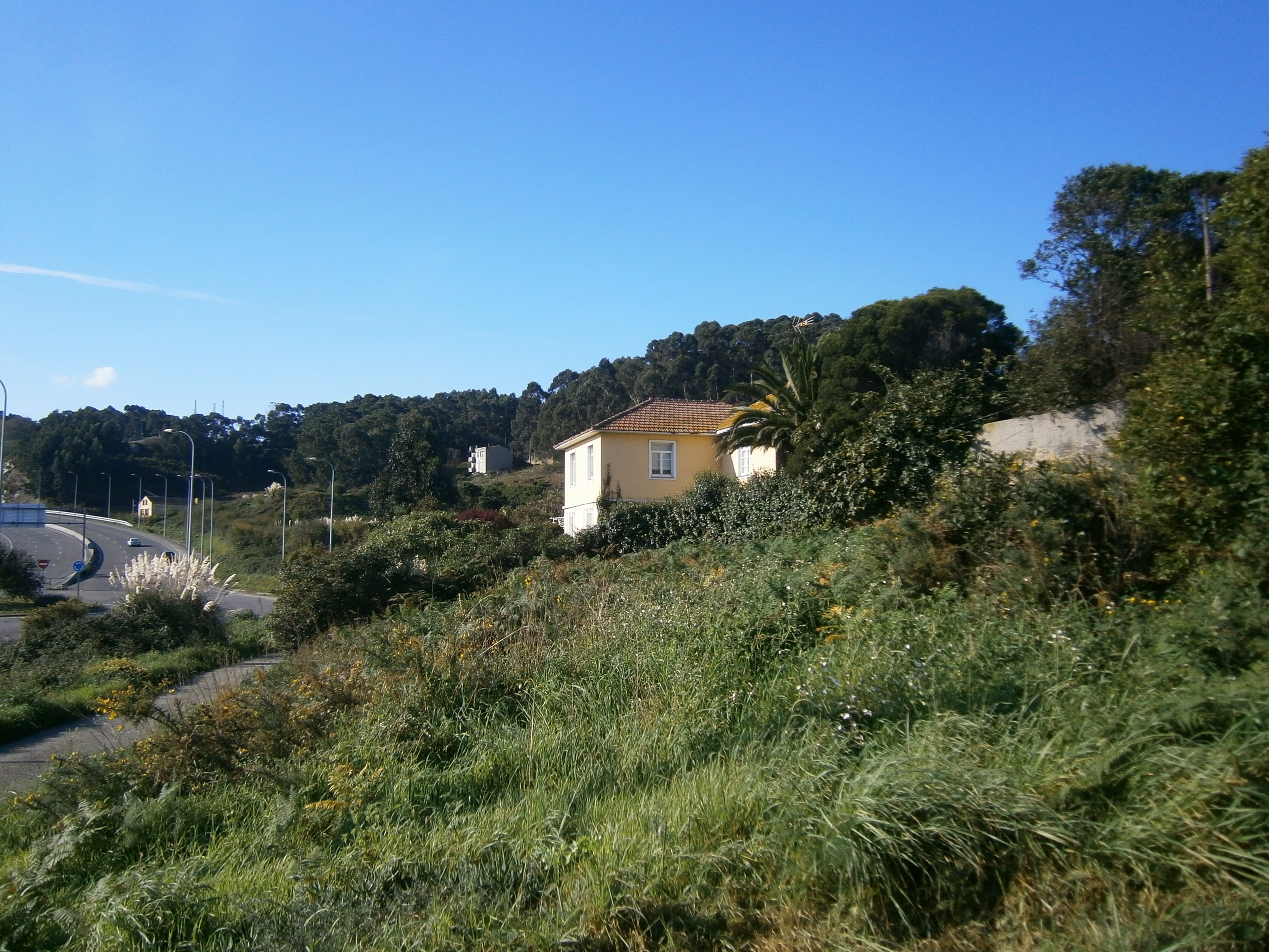 O Coidal, Visma, xunto á Terceira Ronda